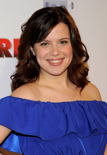 Andrea Ros